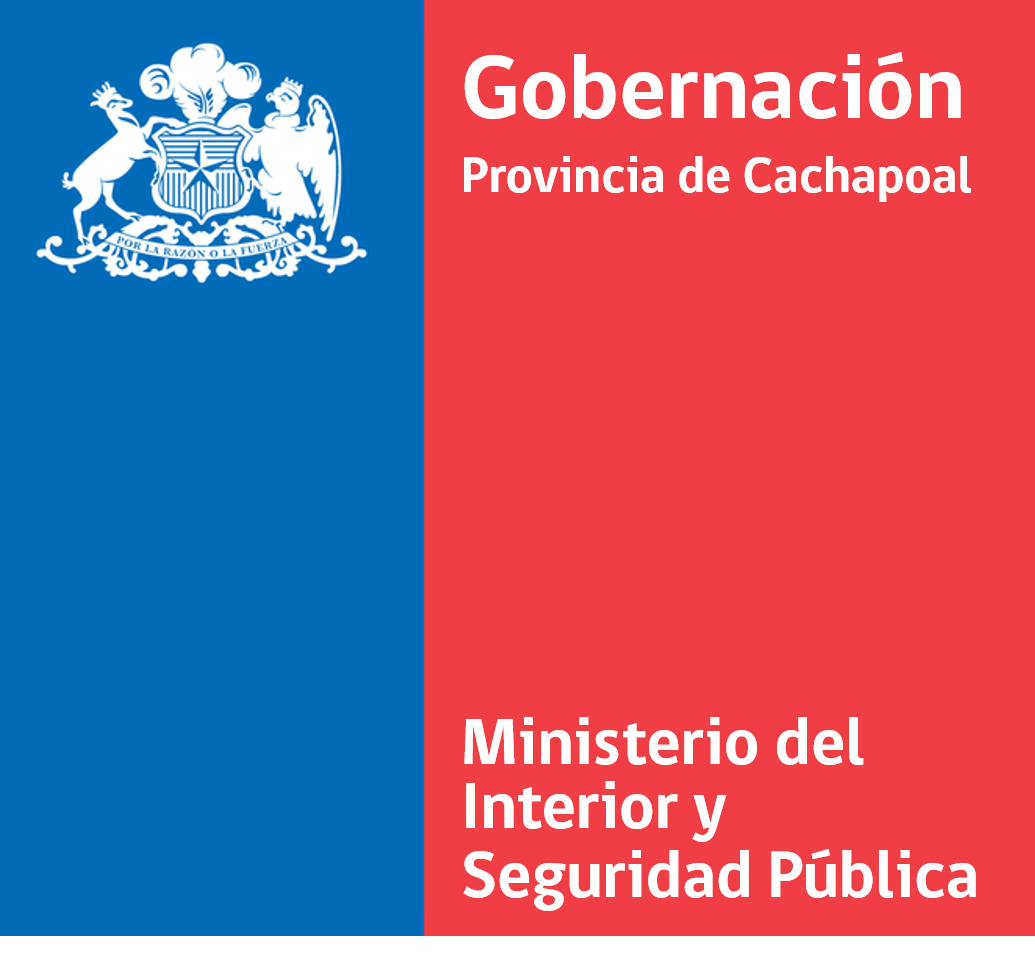 Logotipo de la gobernación provincial, usado desde 2010, durante la administración de Sebastián Piñera.